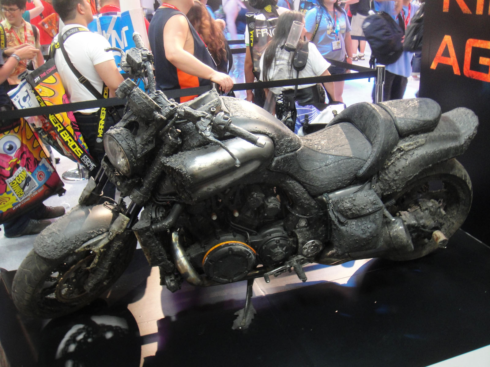 Ghost Ride VMax